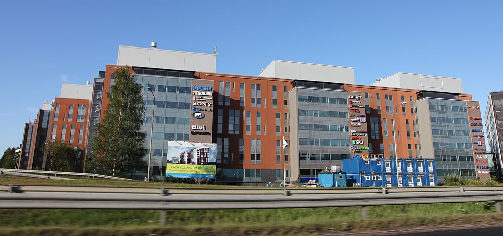 Vantaan Veromiehen aluetta Kehä III:n varrella. Kuvan rakennusryppäässä toimii esimerkiksi Uponorin pääkonttori. Huom: Muista säilyttää viittaus kuvaajaan, mikäli käytät kuvaa.